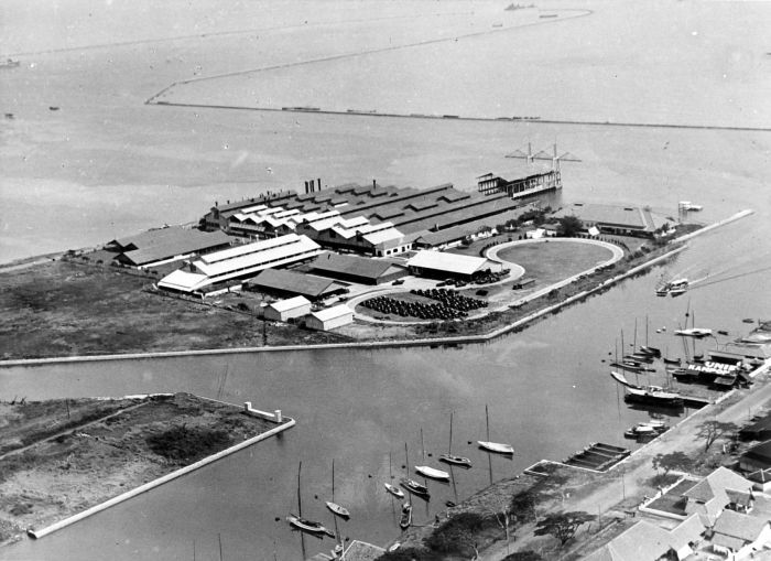 Repronegatief. Overzicht gebouwen General Motors, Tandjoengpriok, Batavia, Java